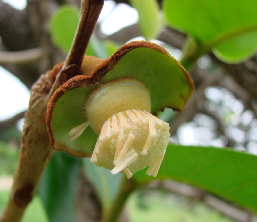 Annona crassiflora - ANNONACEAE Brasília - Distrito Federal - Brasil.